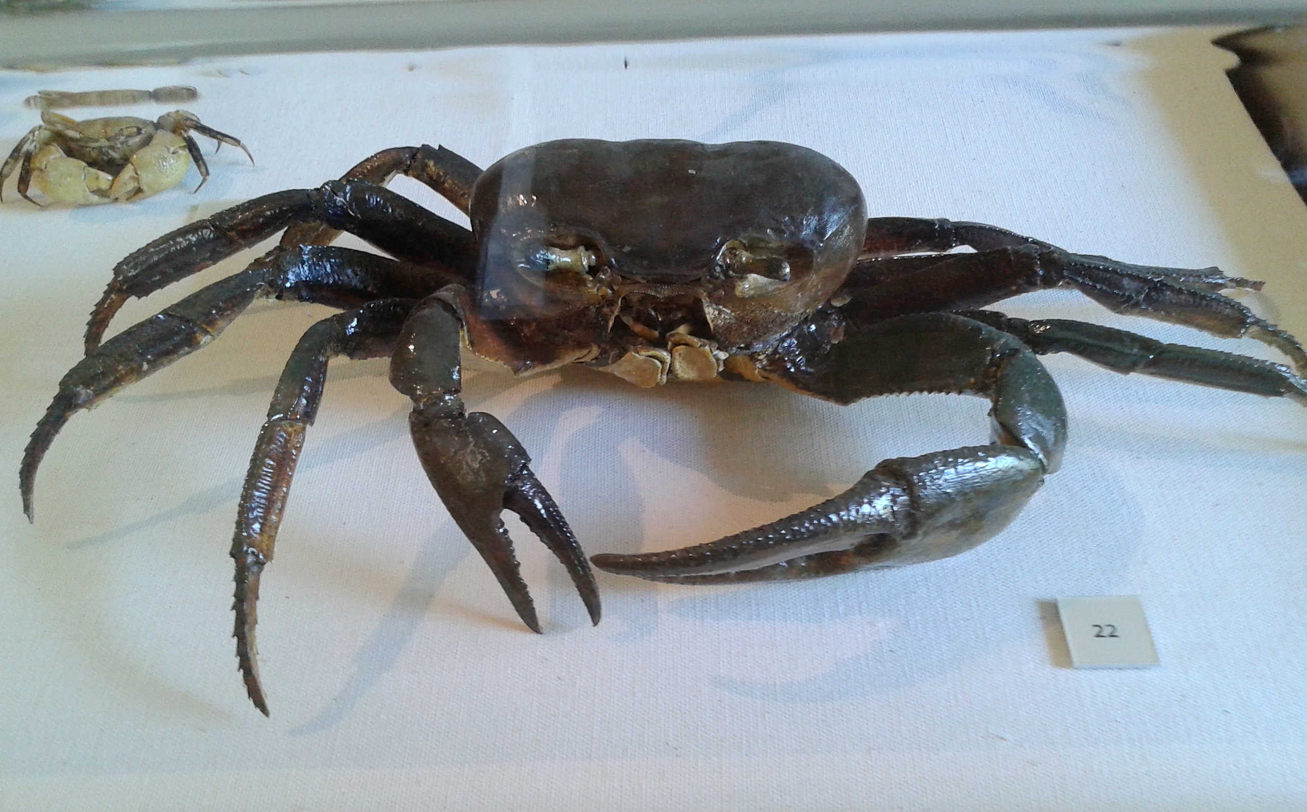 Guaiamu, ou Cardisoma guanhumi (Larreille, 1828). Acervo de invertebrados marinhos do Museu Nacional/UFRJ. Rio de Janeiro, RJ, Brasil.